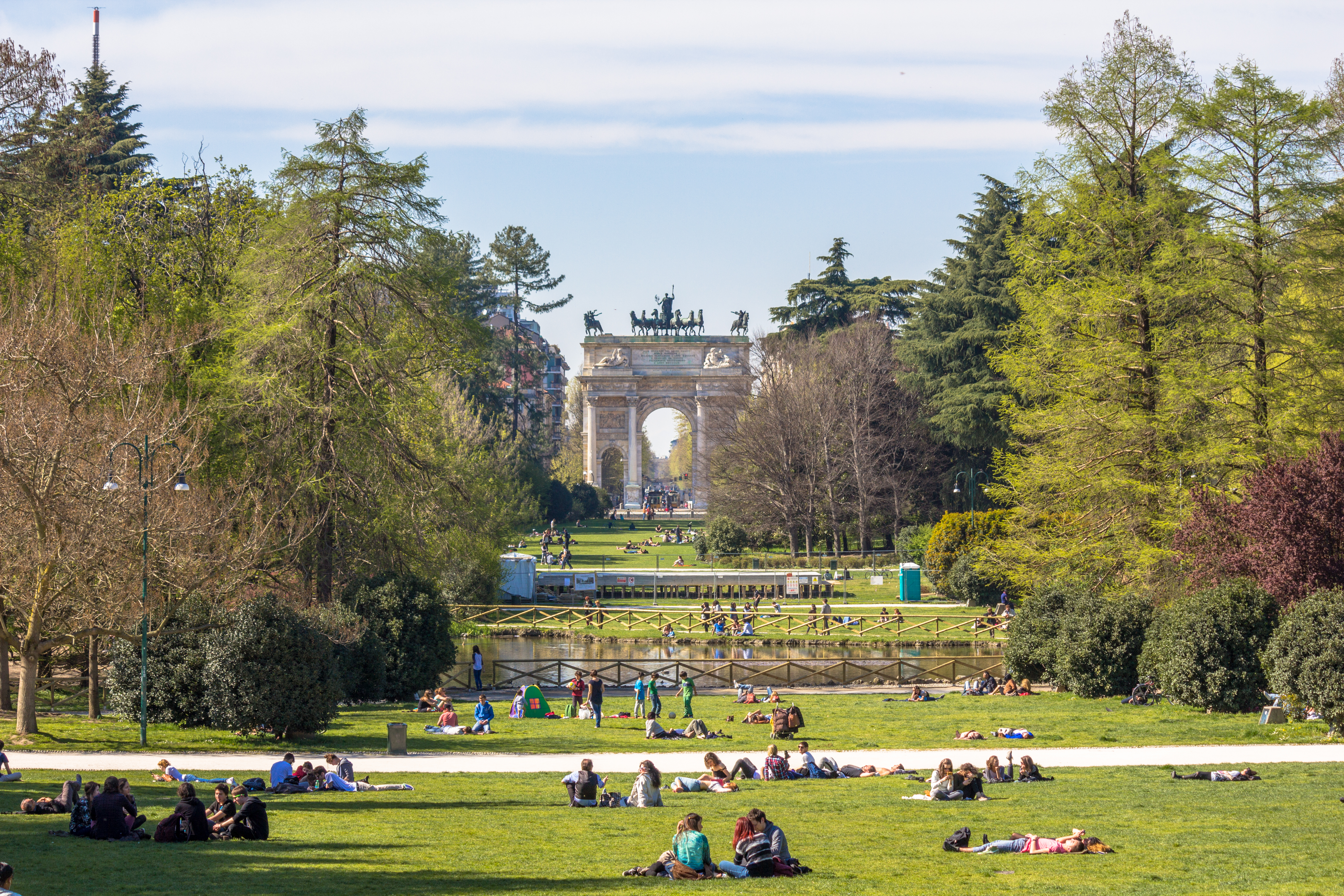 Prospettiva verso l'Arco della Pace, Parco Sempione Milano, Italia. This is a photo of a monument which is part of cultural heritage of Italy.